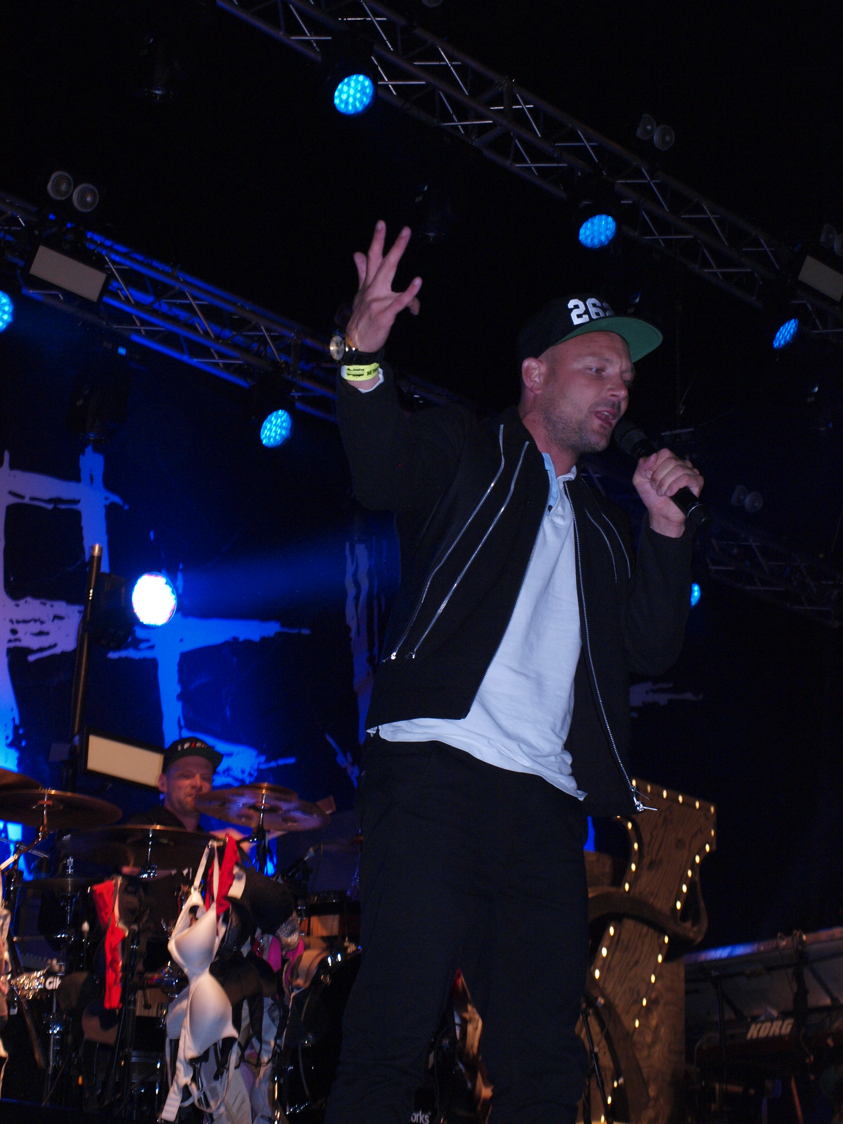 Orgi-E (Suspekt) under koncerten Studierock i Kolding, 4. september 2015